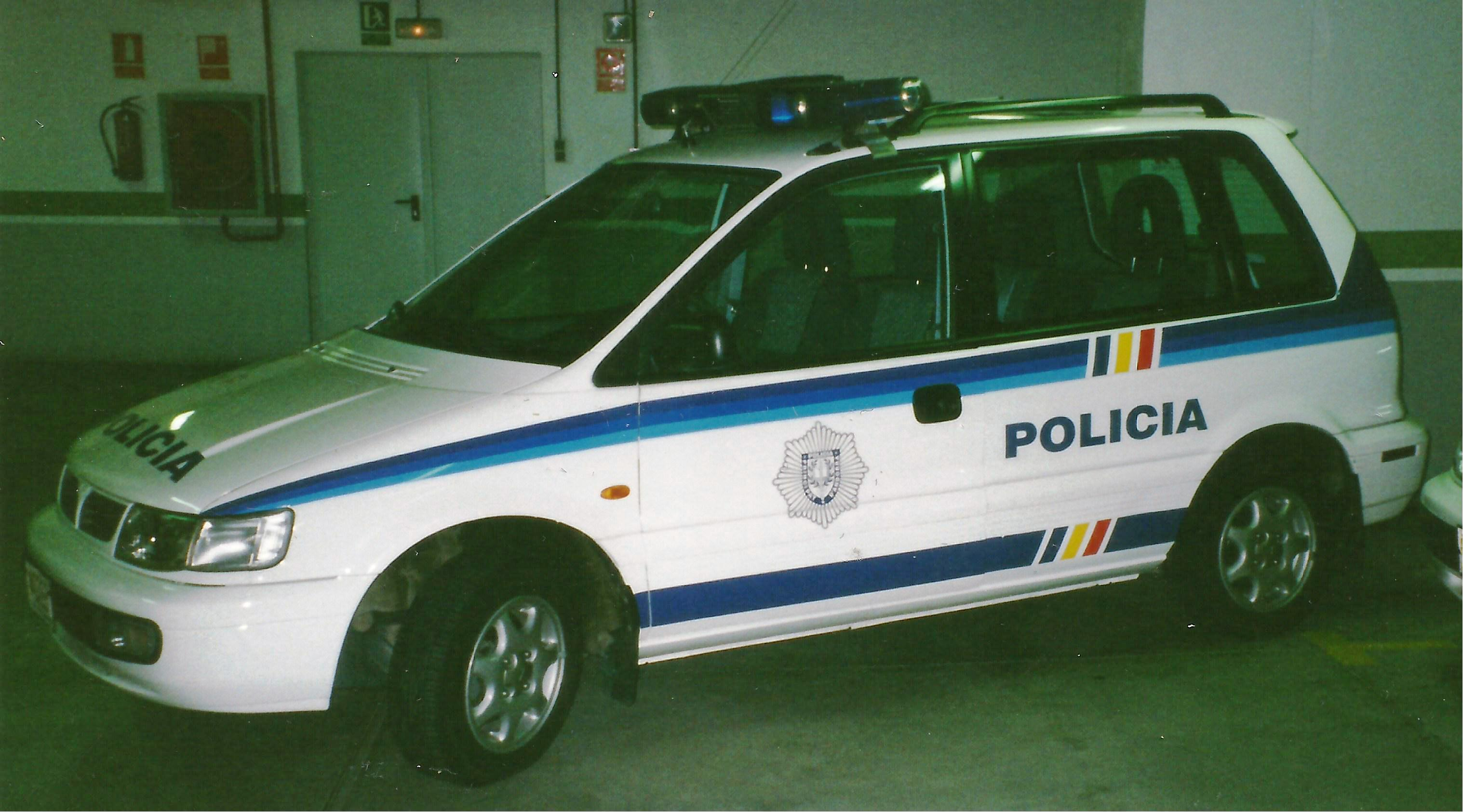 Politie auto uit Andorra